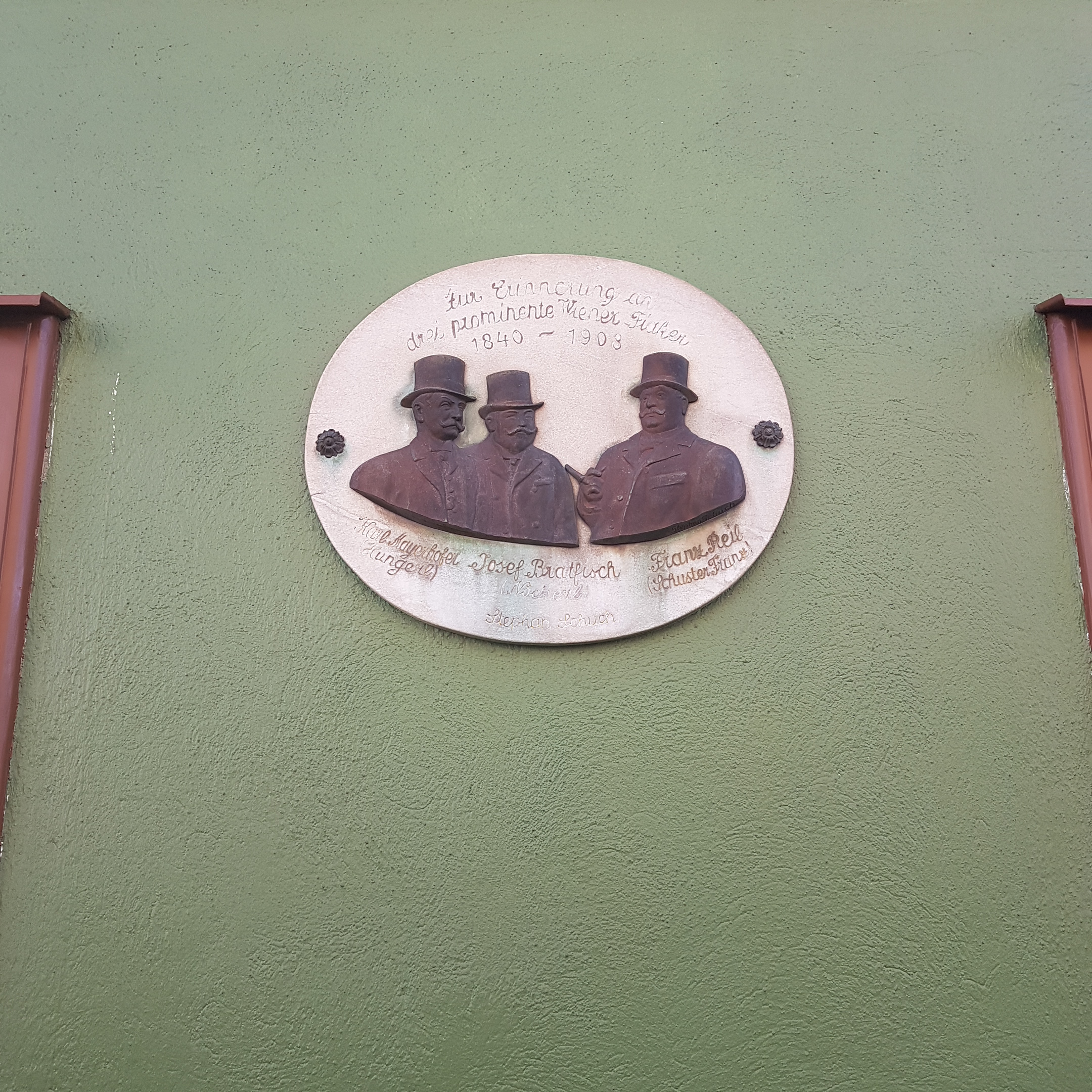 Gedenktafel in der Lacknergasse 60, 1170 Wien